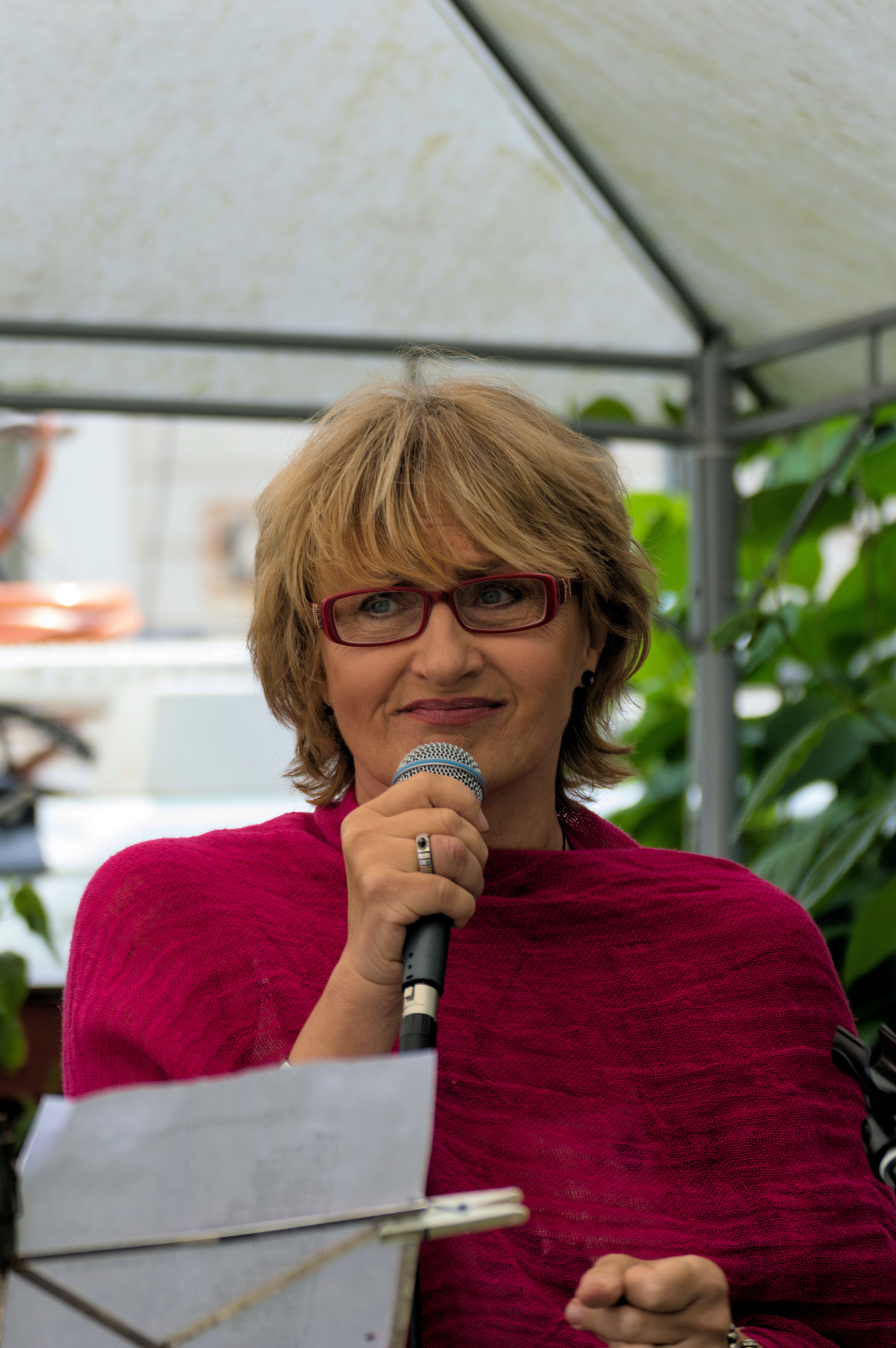 Ami Aspelund suomalainen laulaja